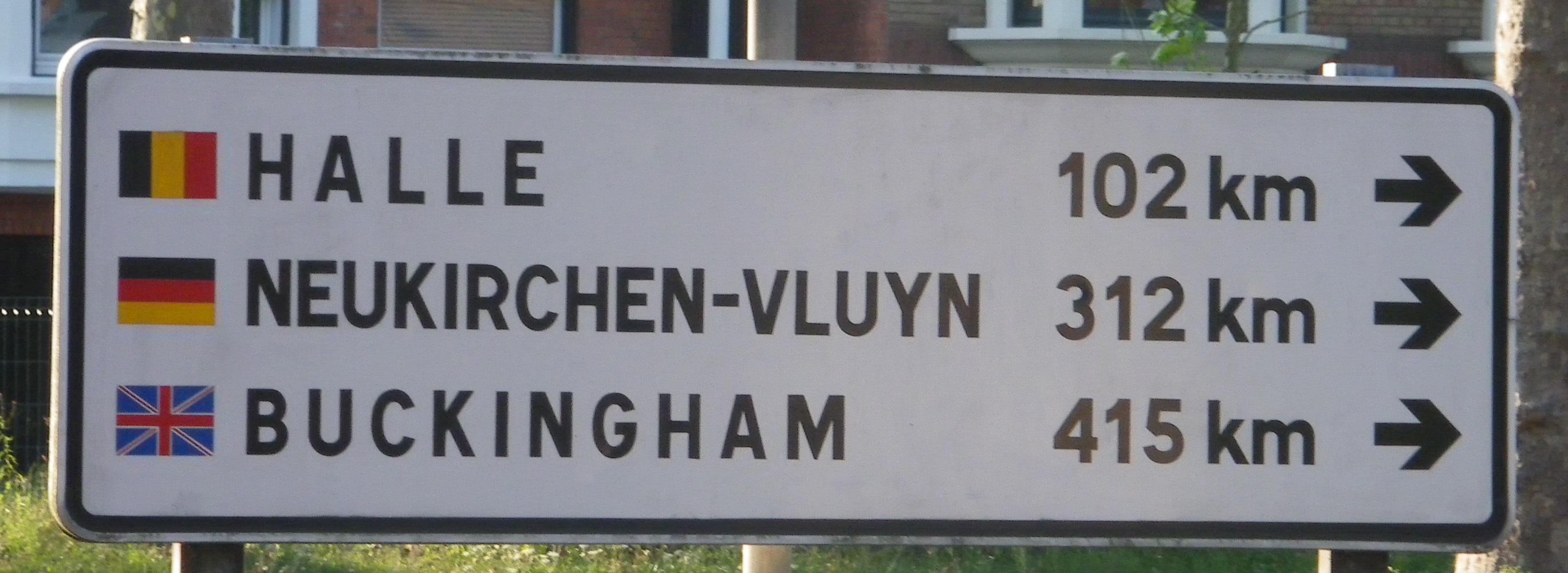 Vue d'un panneau montrant les communes jumelées avec la ville de Mouvaux.